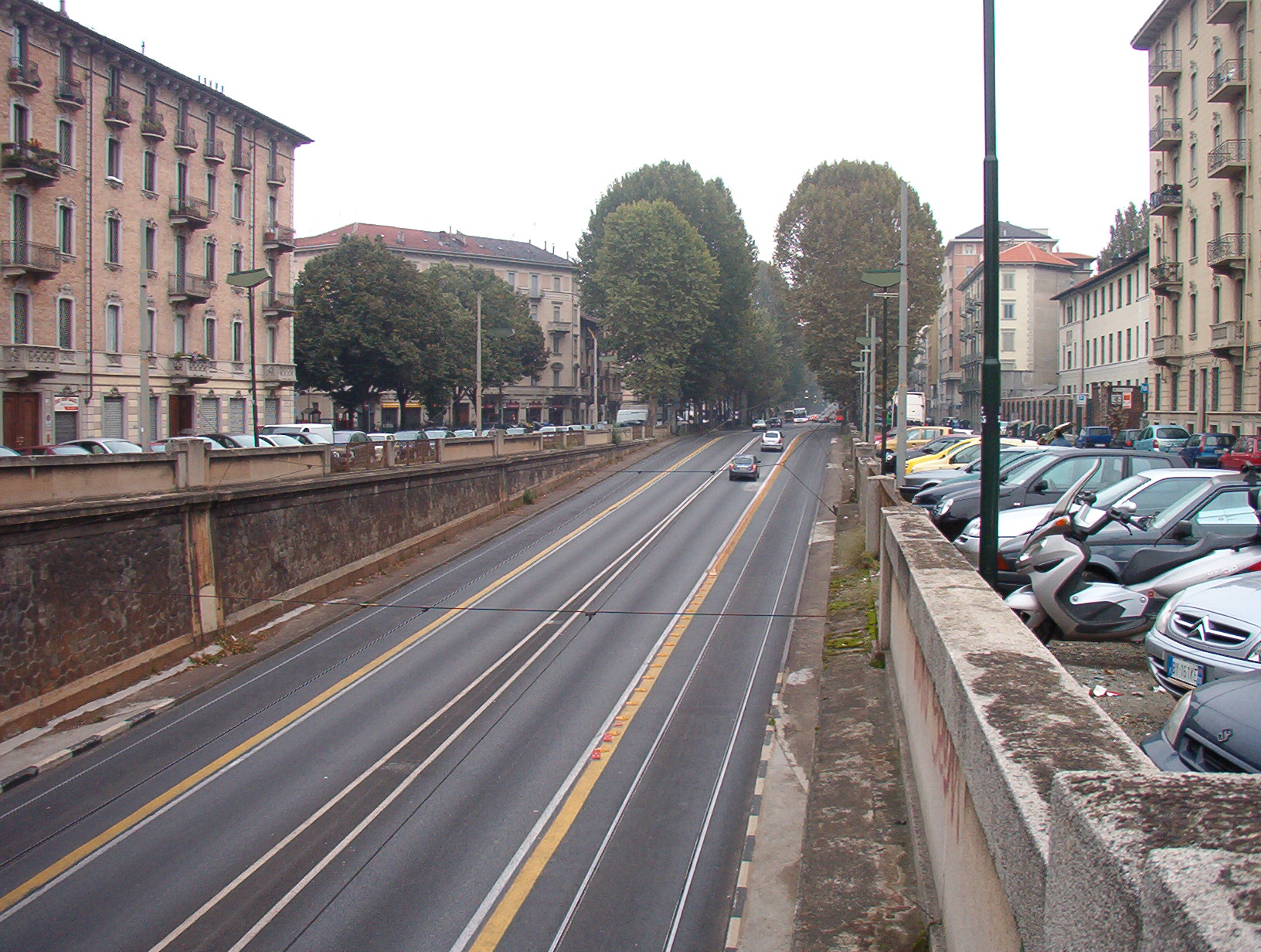 Corso Regina Margherita - Torino - Italy